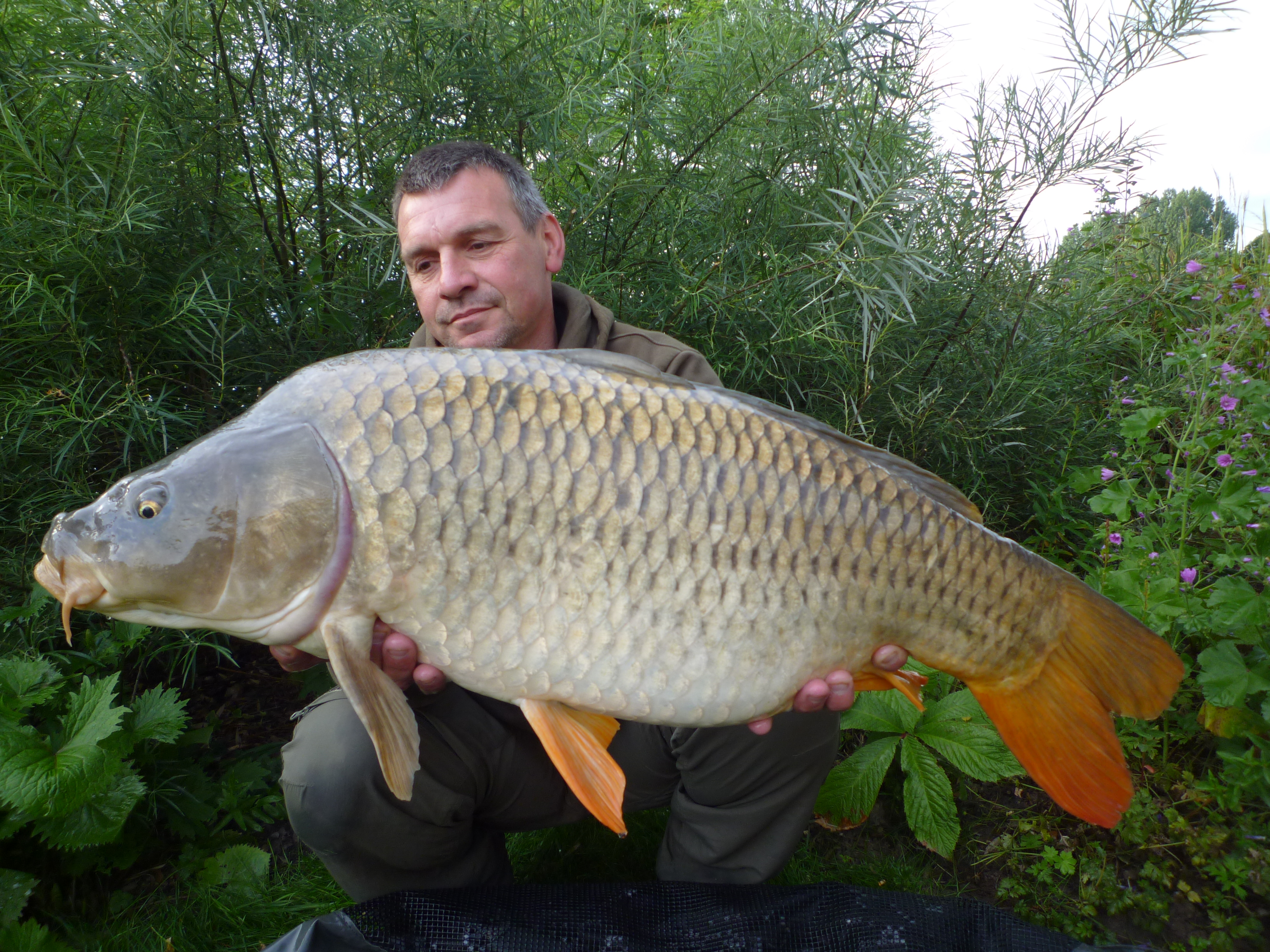 poisson du lac